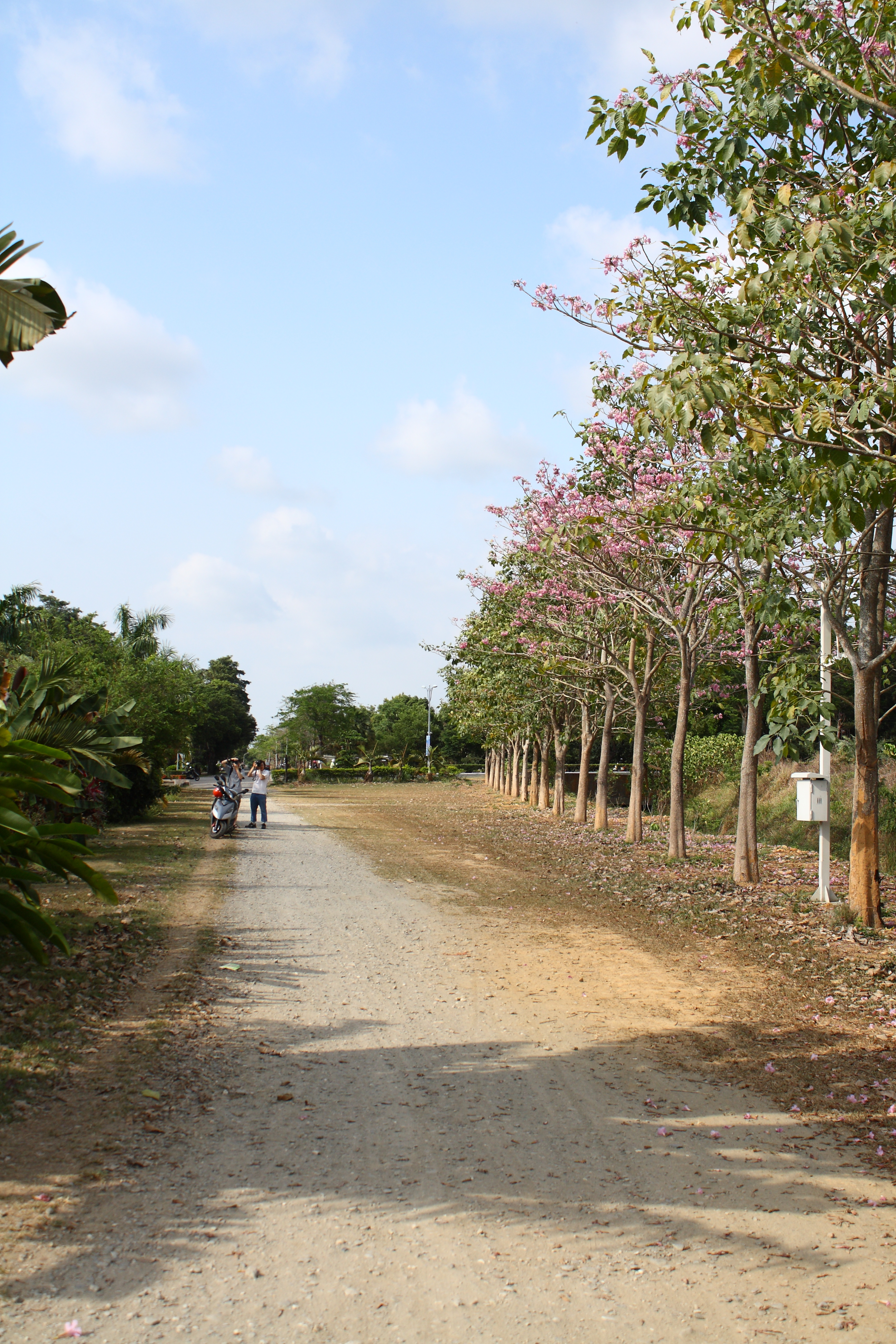 屏東科技大學一景